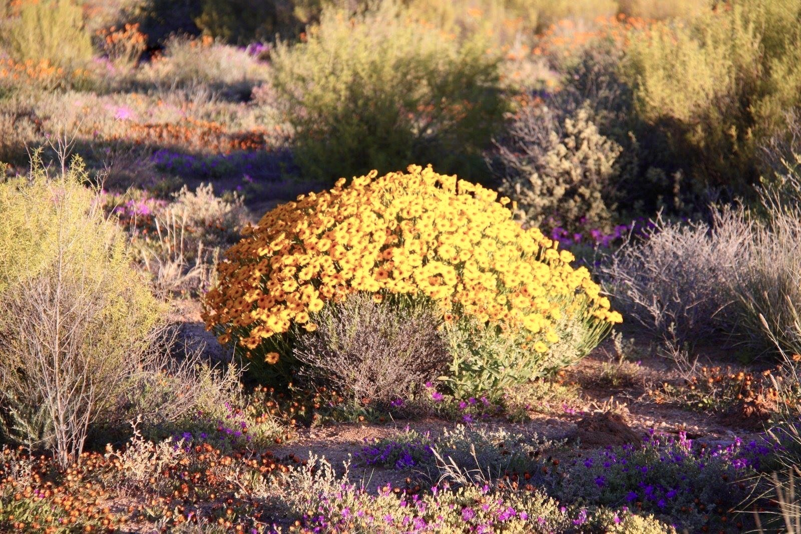 Efémeras em plena floração na Reserva Natural de Geogap, Springbok